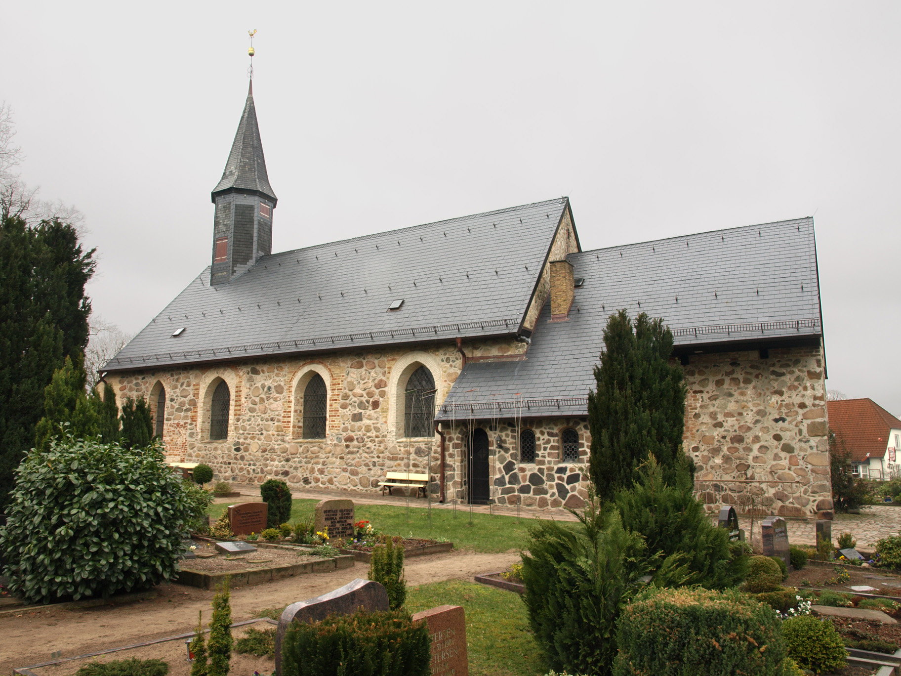 Bosdorf, Schleswig-Holstein, St. Andreas Haddeby, Südseite, Foto: 2011